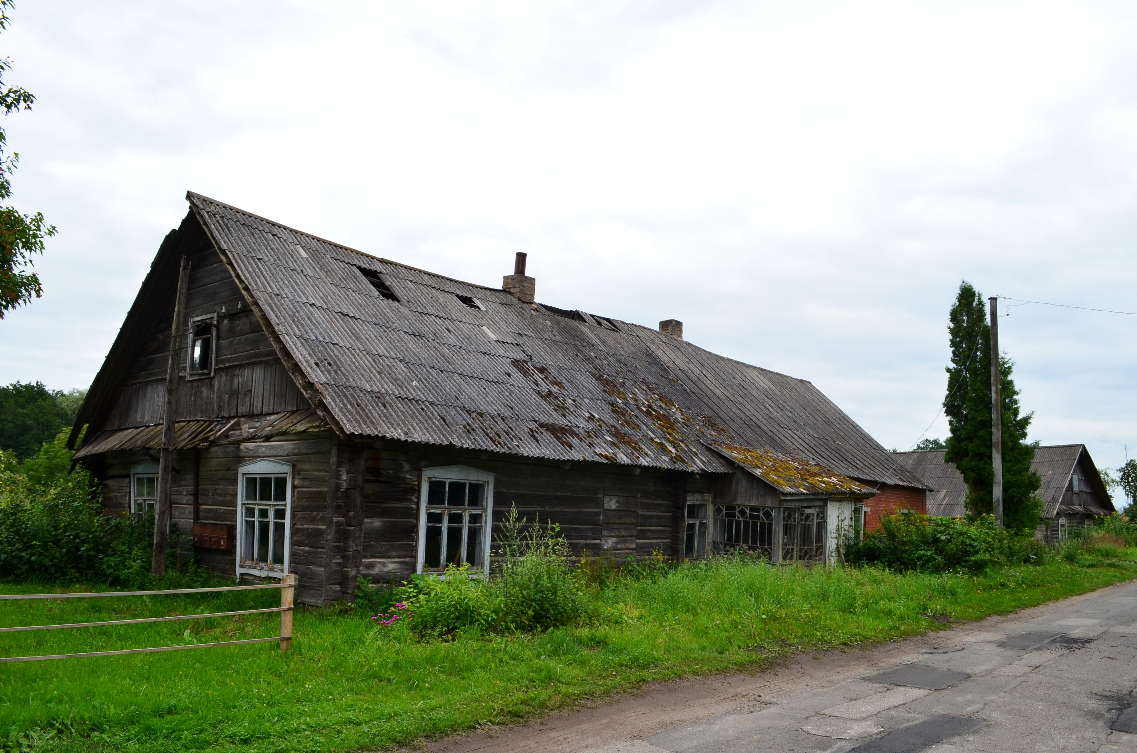 Č. Kudabos g., Tverečius, Ignalinos raj.